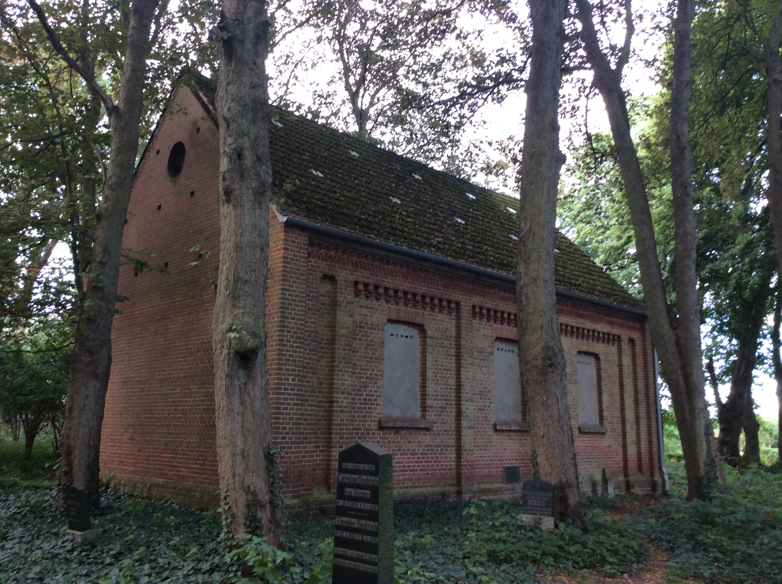 Die Kapelle in Alt Ungnade (Gemeinde Levenhagen, Landkreis Vorpommern-Greifswald) ist ein neugotische Backsteinbau des Schinkel-Schülers Menzel aus dem Jahr 1851. Über dem Westportal befindet sich eine spitzbogenförmige Blende mit Rundfenster und Giebelturm.